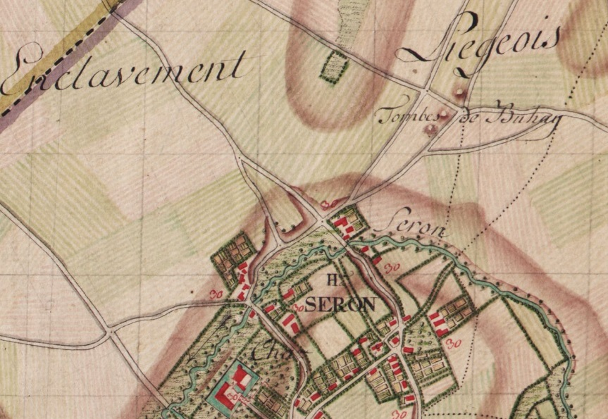 Extrait de la carte de Ferraris n° 135A